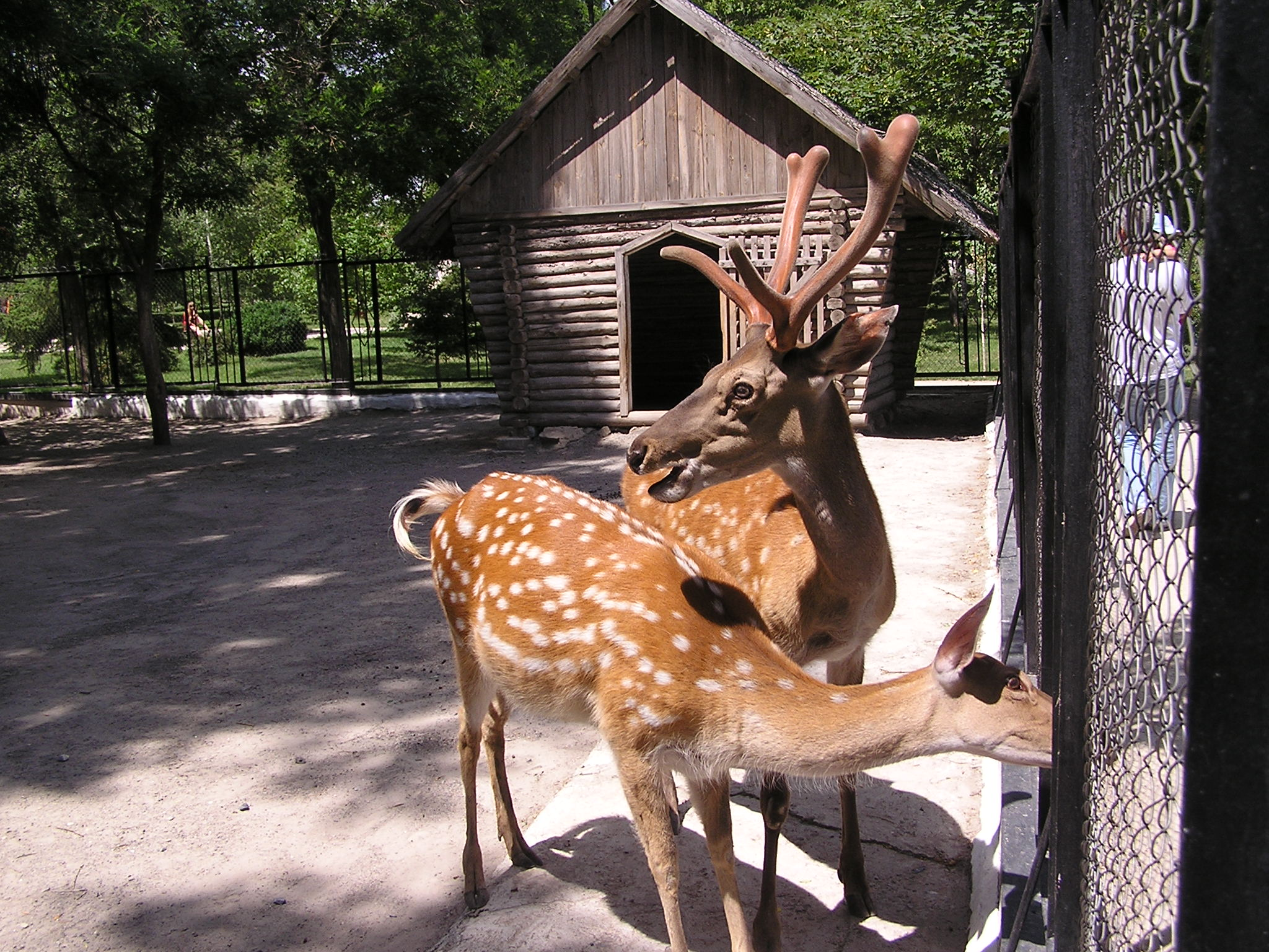 Зоопарк в Докучаевске This pfotography taken in Dokuchaevsk ZOO Note: ZOO co-ordinates is